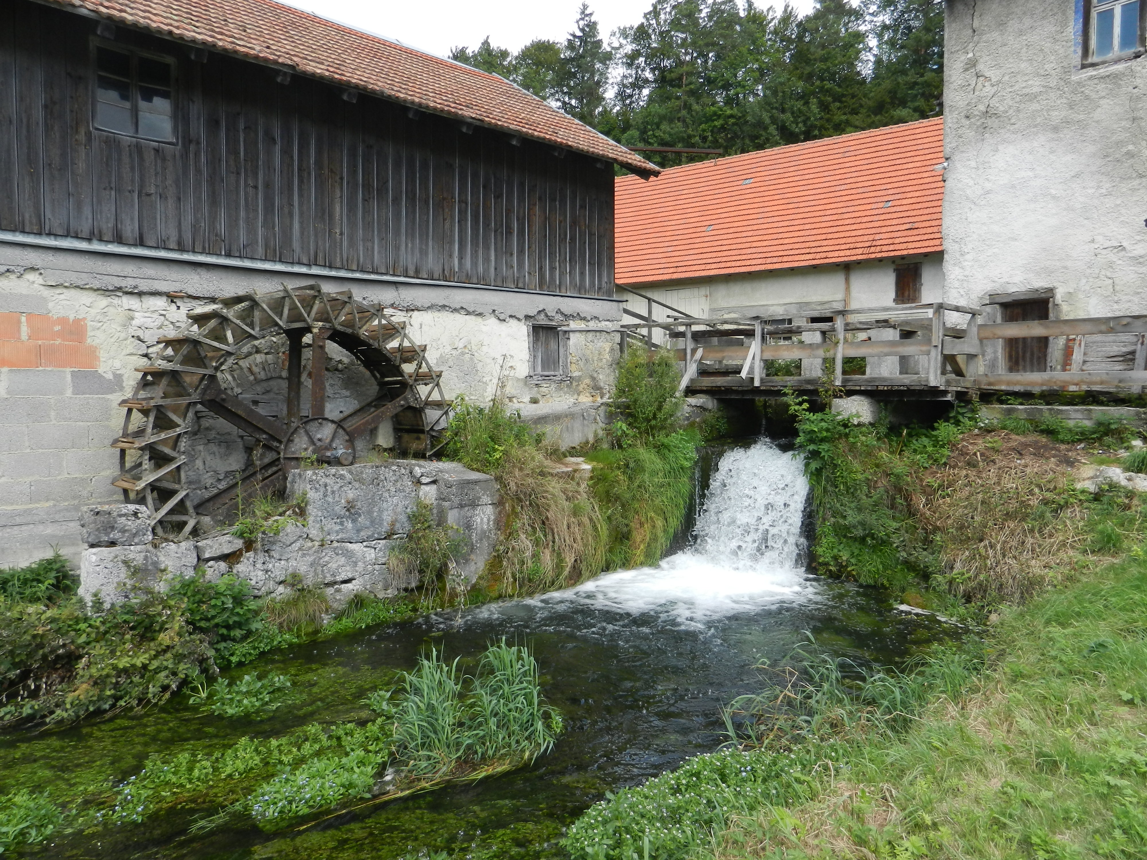 Die Walzmühle bei Burladingen an der Lauchert